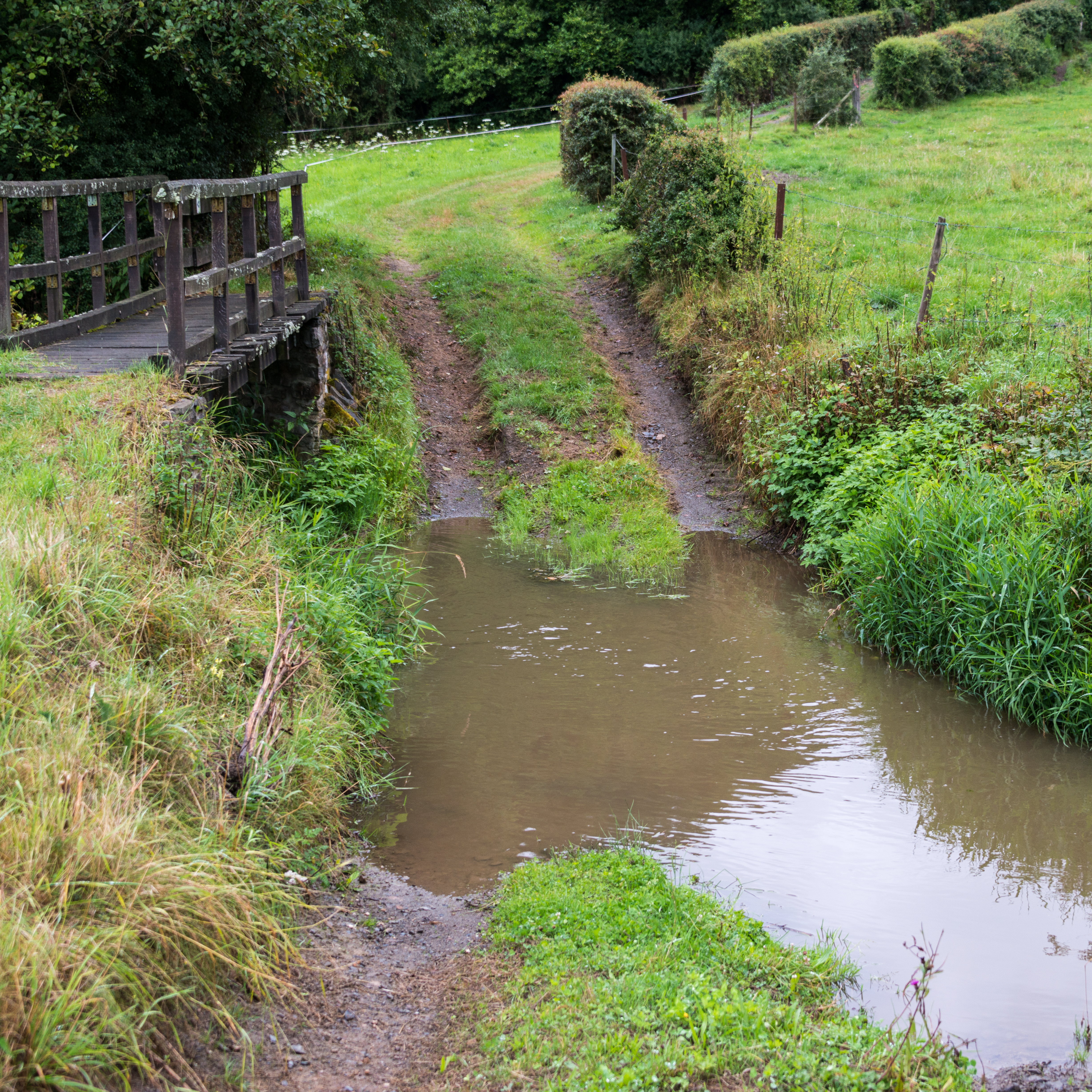 D'Fuurt bei der Pëntscherbréck zu Pënsch.